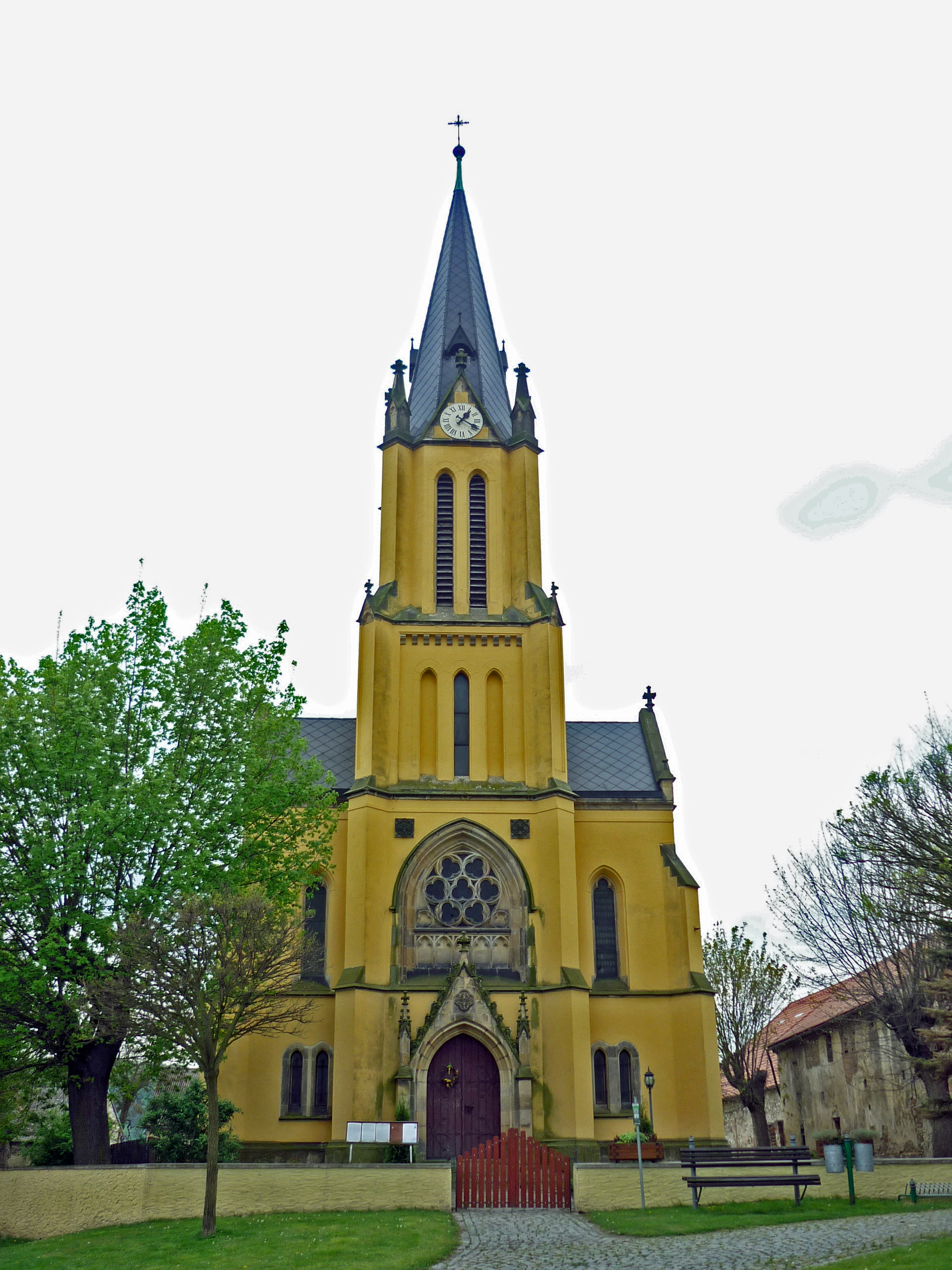 Kirche in Libochowan (Libochovany) an der Elbe im Böhmischen Mittelgebirge